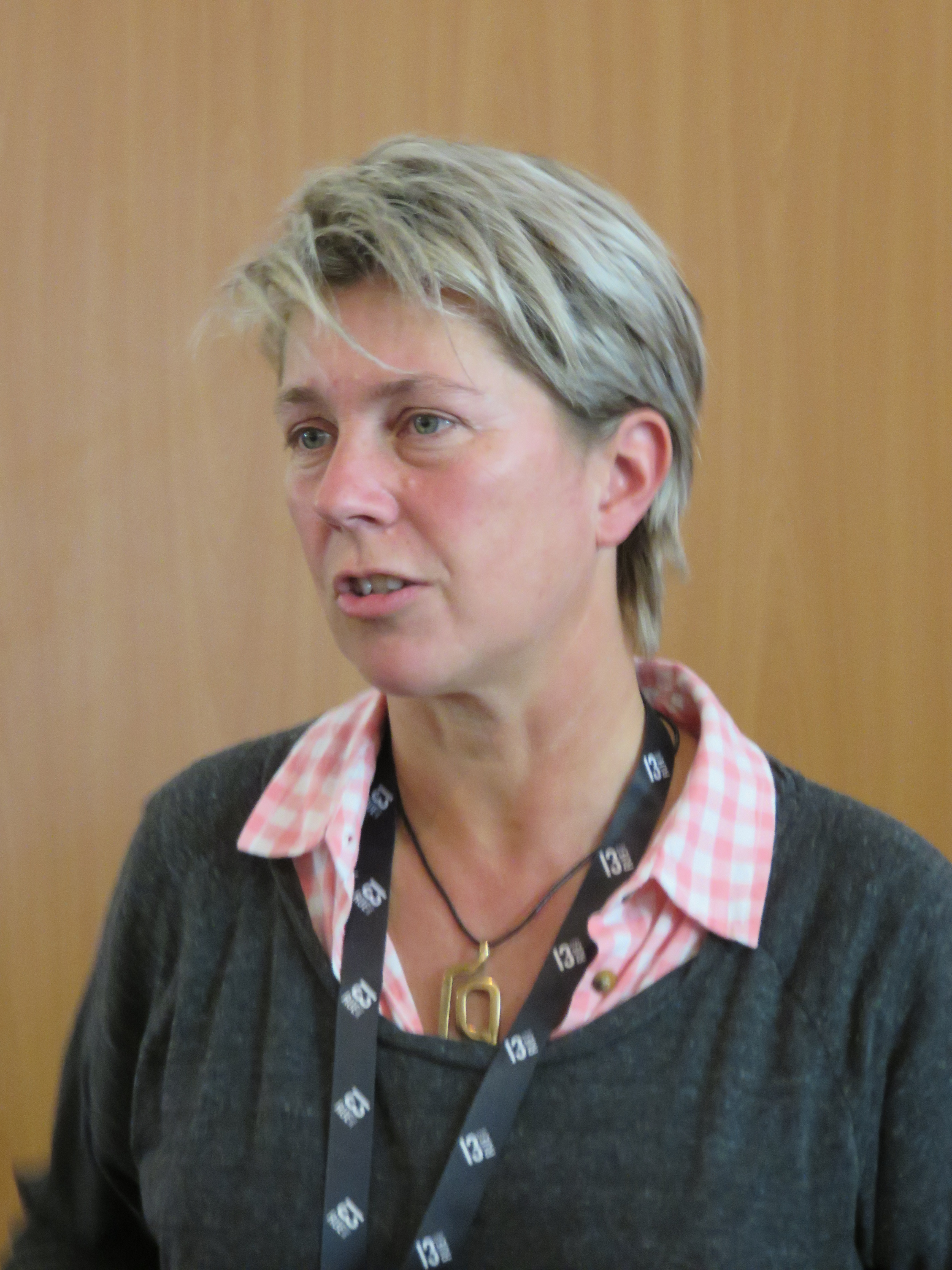 Sandrine Collette, auteur de romans policiers, au 7e Festival international des littératures policières de Toulouse